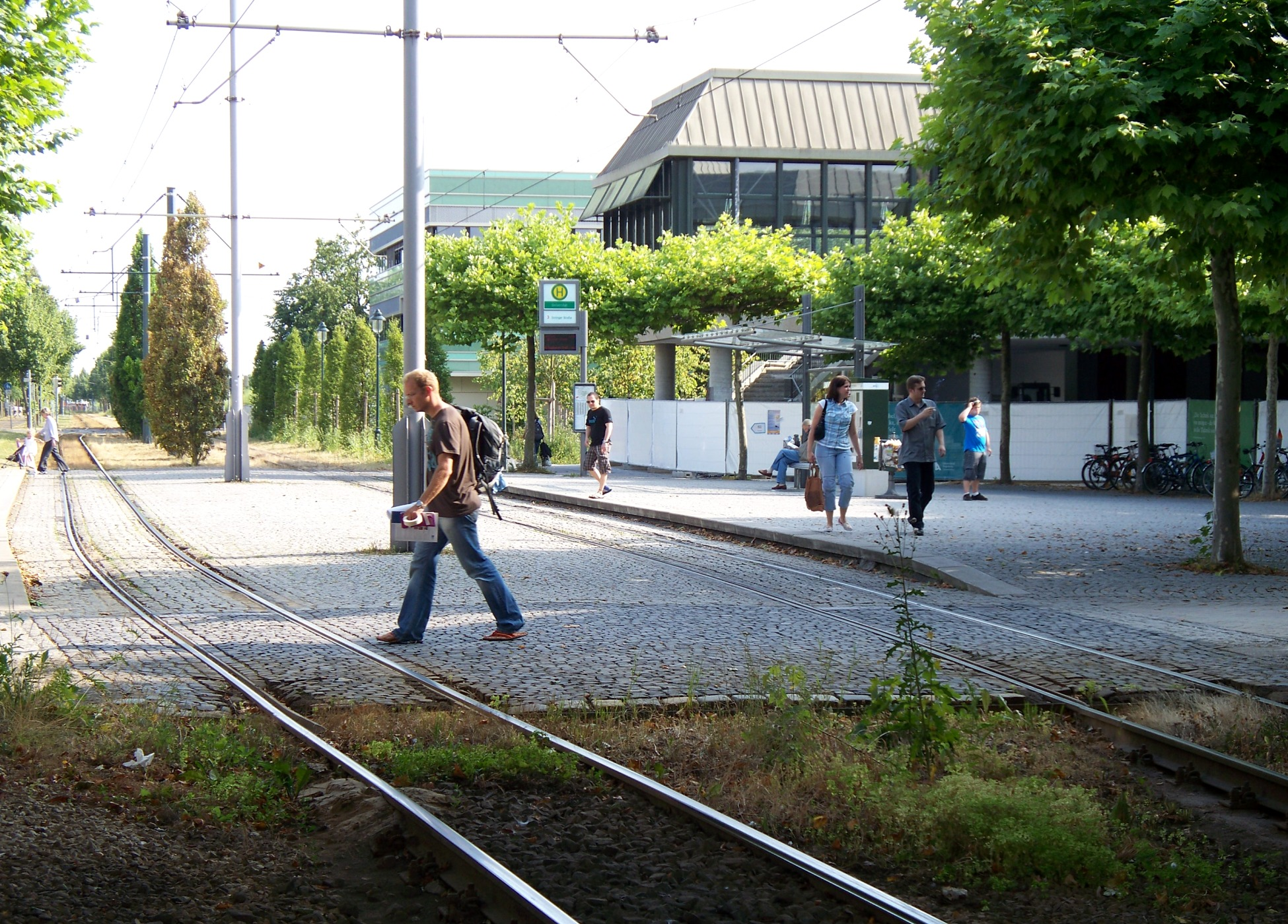 Tramstation an der Universität Augsburg.